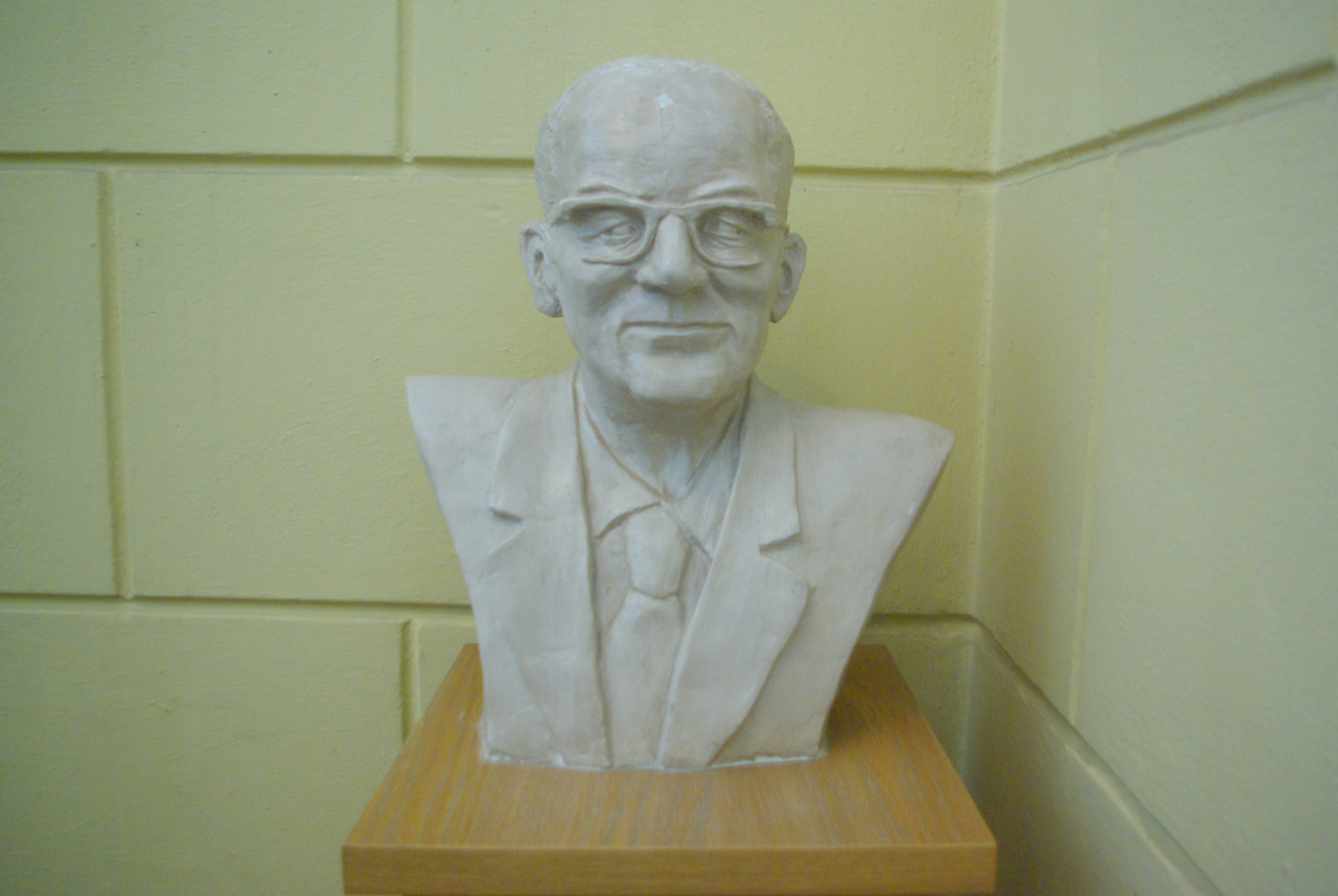 Popiersie Juliana Krzyżanowskiego w Ratuszu w Sanoku przy ulicy Rynek 1